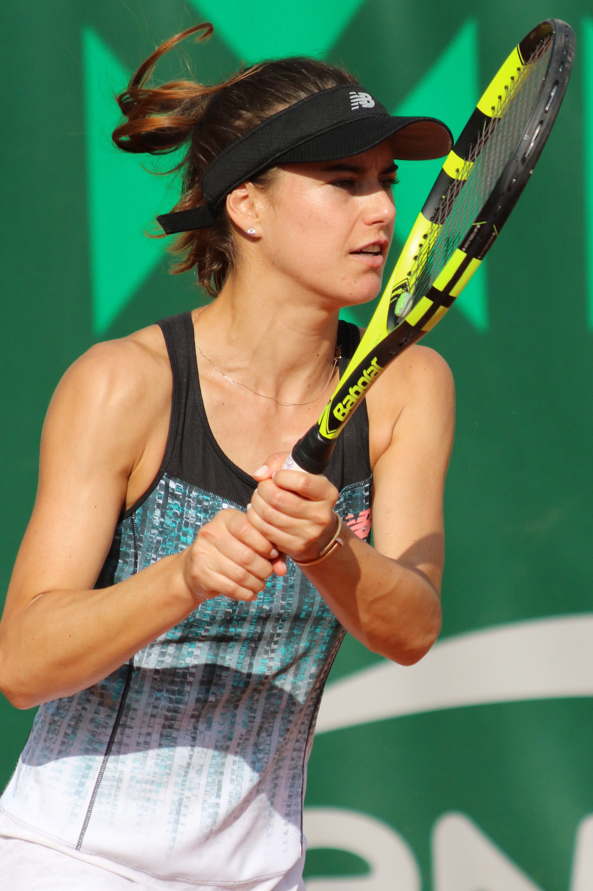 Cirstea RG18 (16)